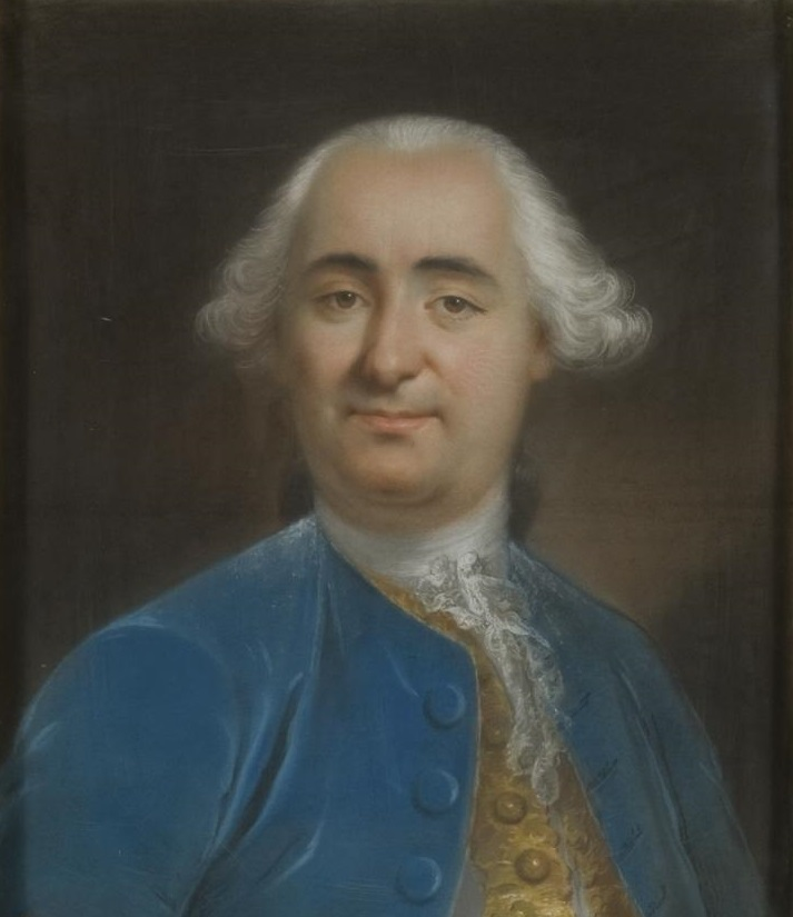 Retrato del arquitecto francés Jaime Marquet (1710-1782).